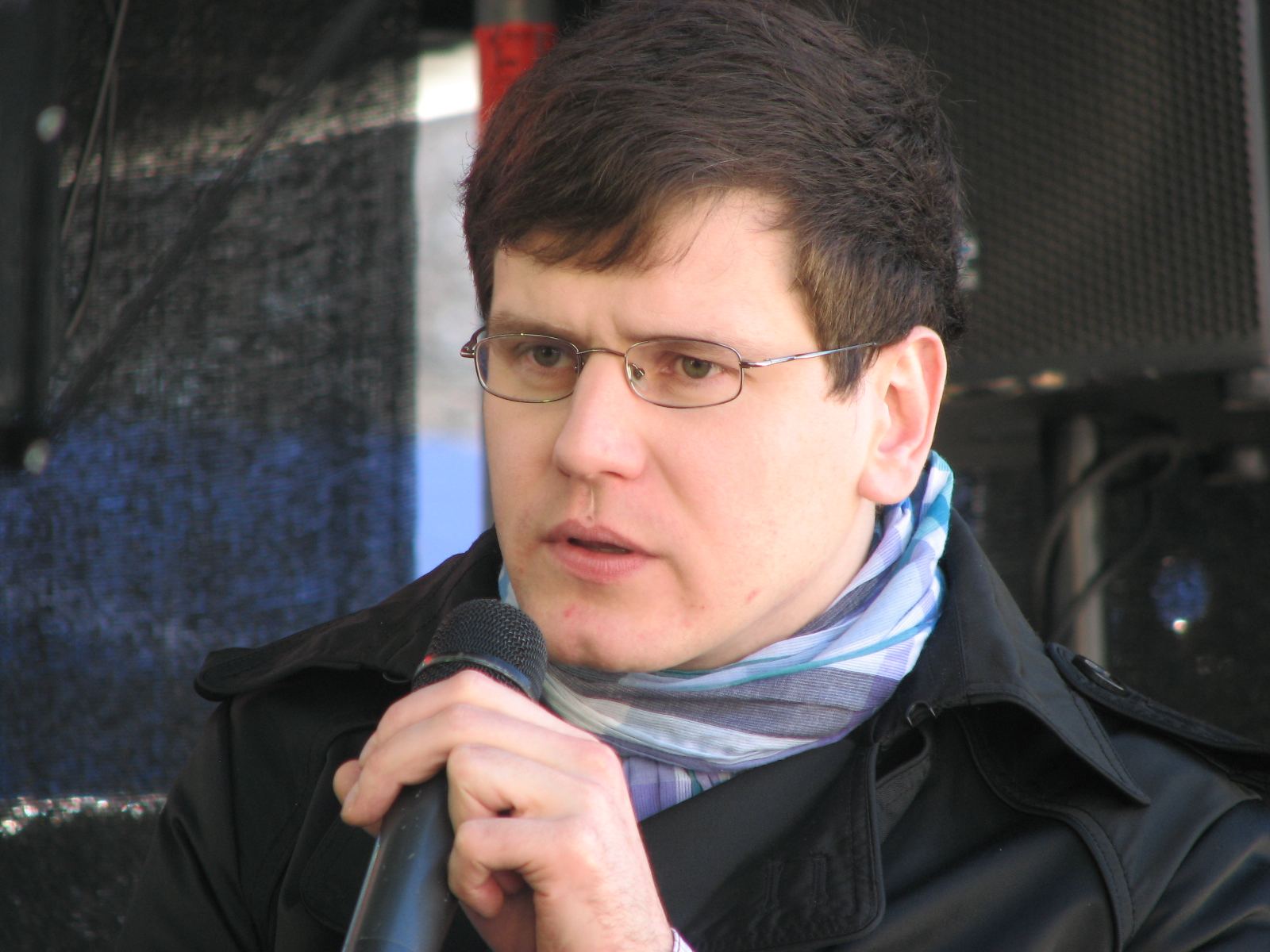 Peeter Helme esinemas Euroopa päeva tähistamisel Vabaduse väljakul